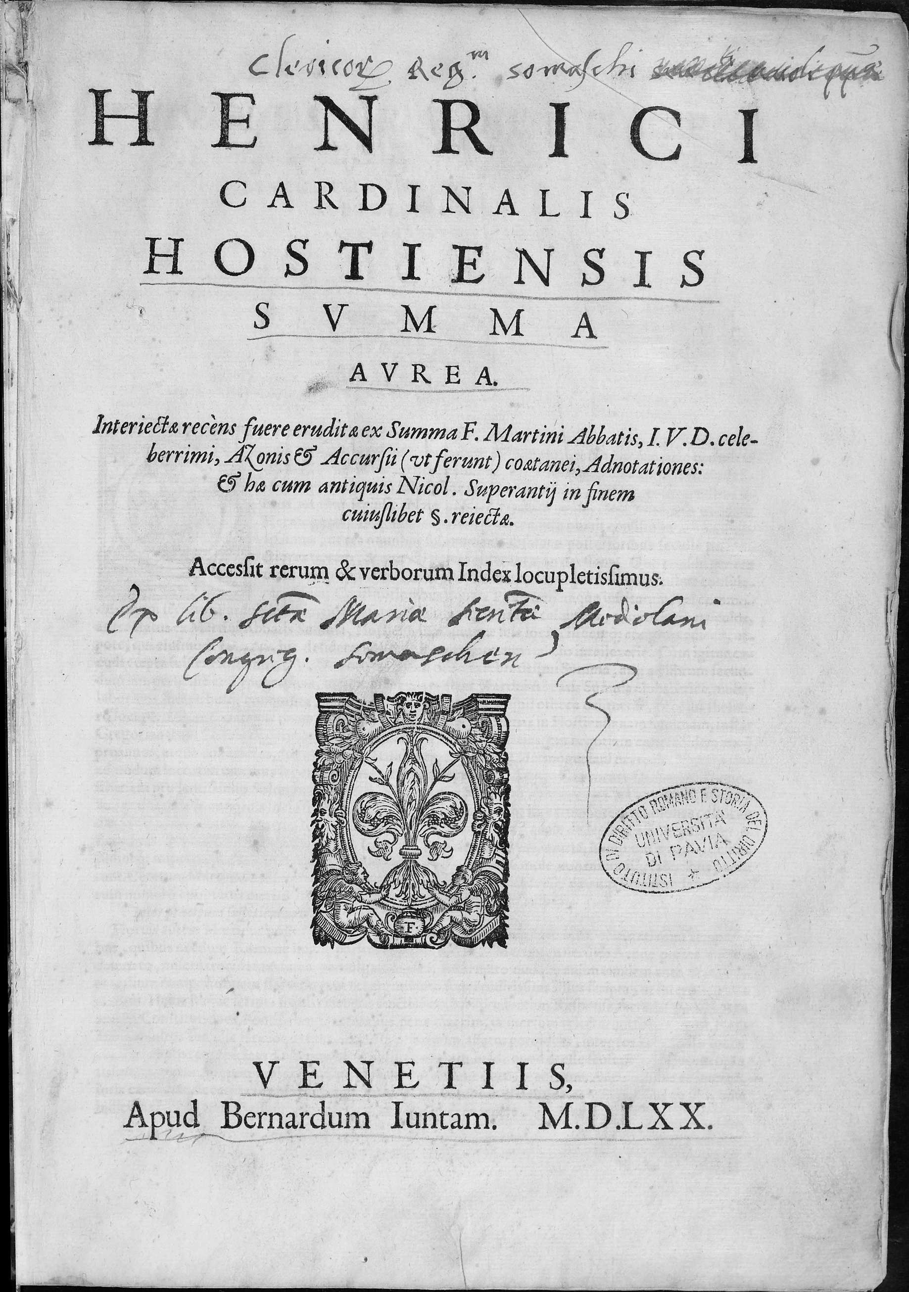 Frontespizio